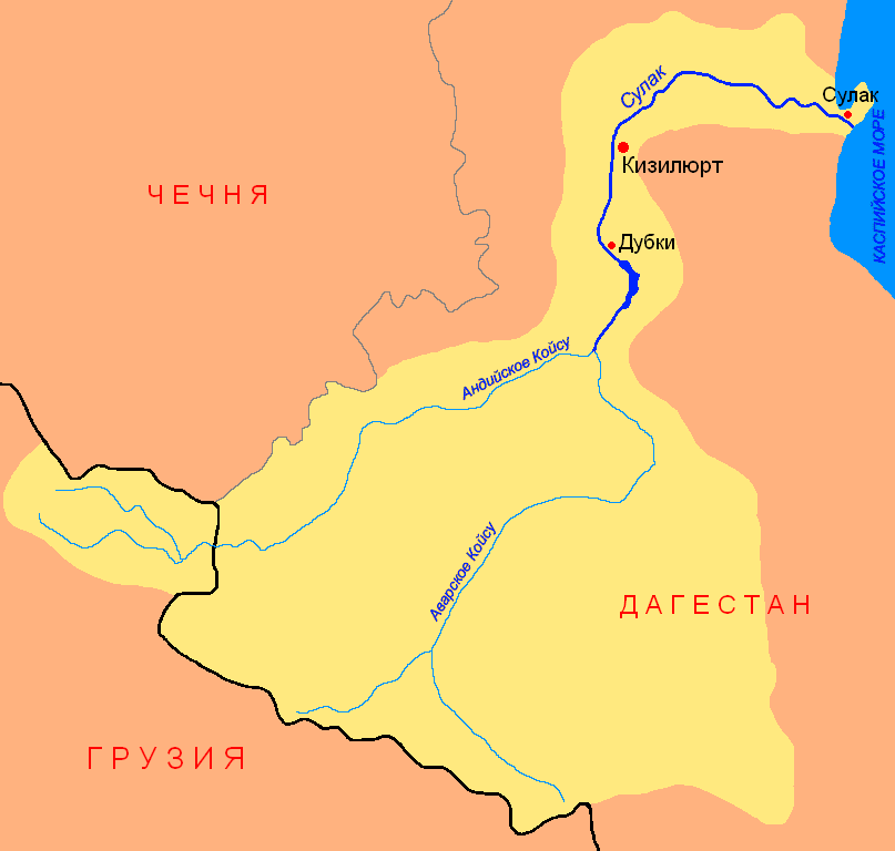 River Sulak in Daguestan (map)